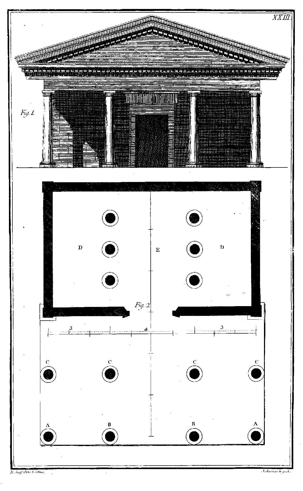 Planta y alzado de un templo a la toscana. Ilustración de Los diez libros de architectura de Vitruvio traducidos y comentados por José Ortiz, Madrid, Imprenta Real, 1787. Firmado: D. Josef Ortiz lo delineó / J. Assensio lo grabó